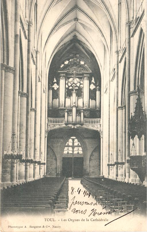 Grandes orgues de 1755 de Nicolas Dupont, détruites en 1940 par un incendie, cathédrale de Toul, 1904.